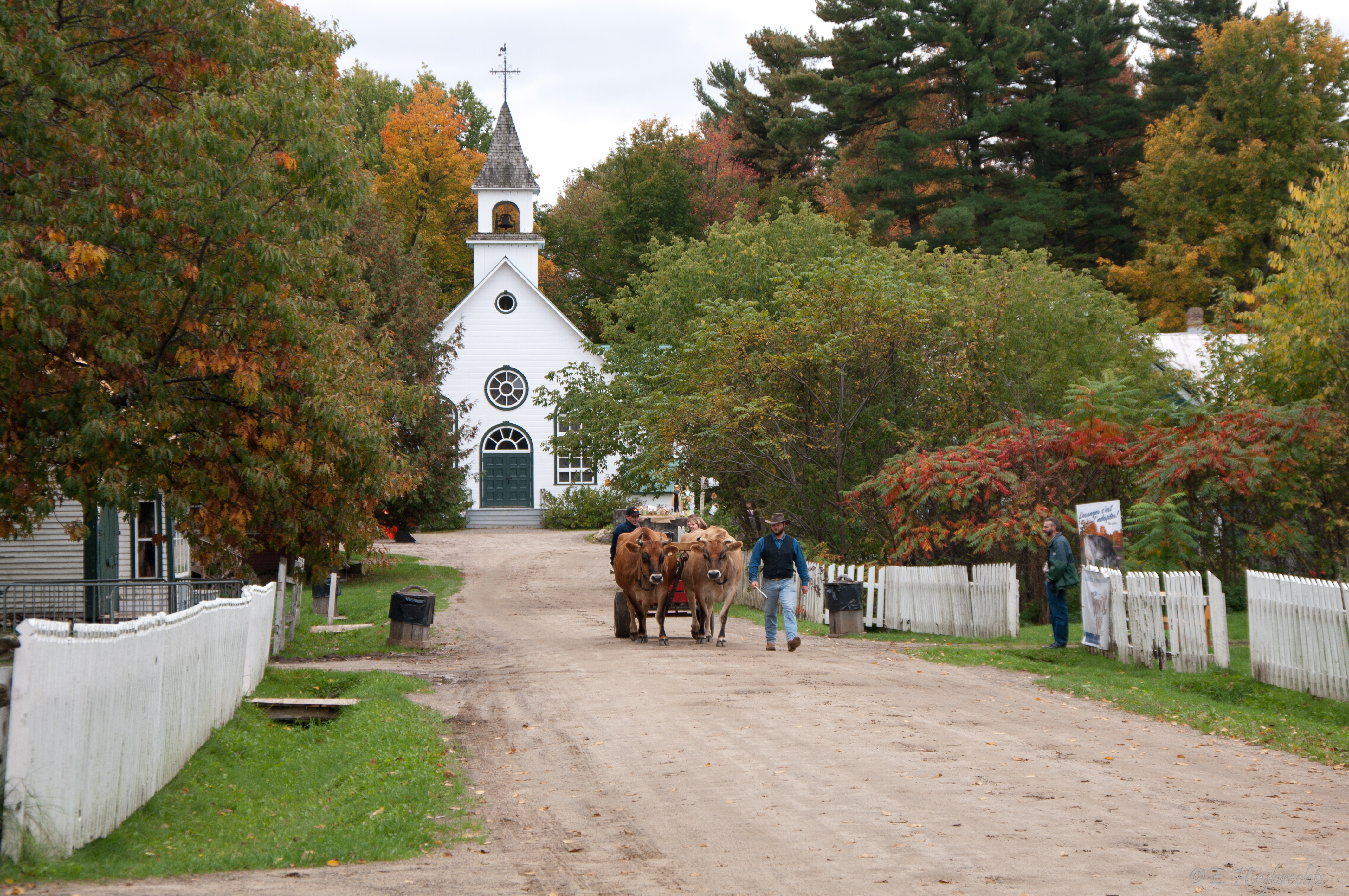 Mais des poubelles de maintenant! Il est un peu décevant que les administrateurs du site n'essaient pas de cacher les artifacts qui ne sont pas d'époque...